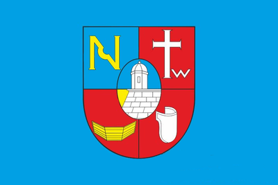 Прапор Золочева